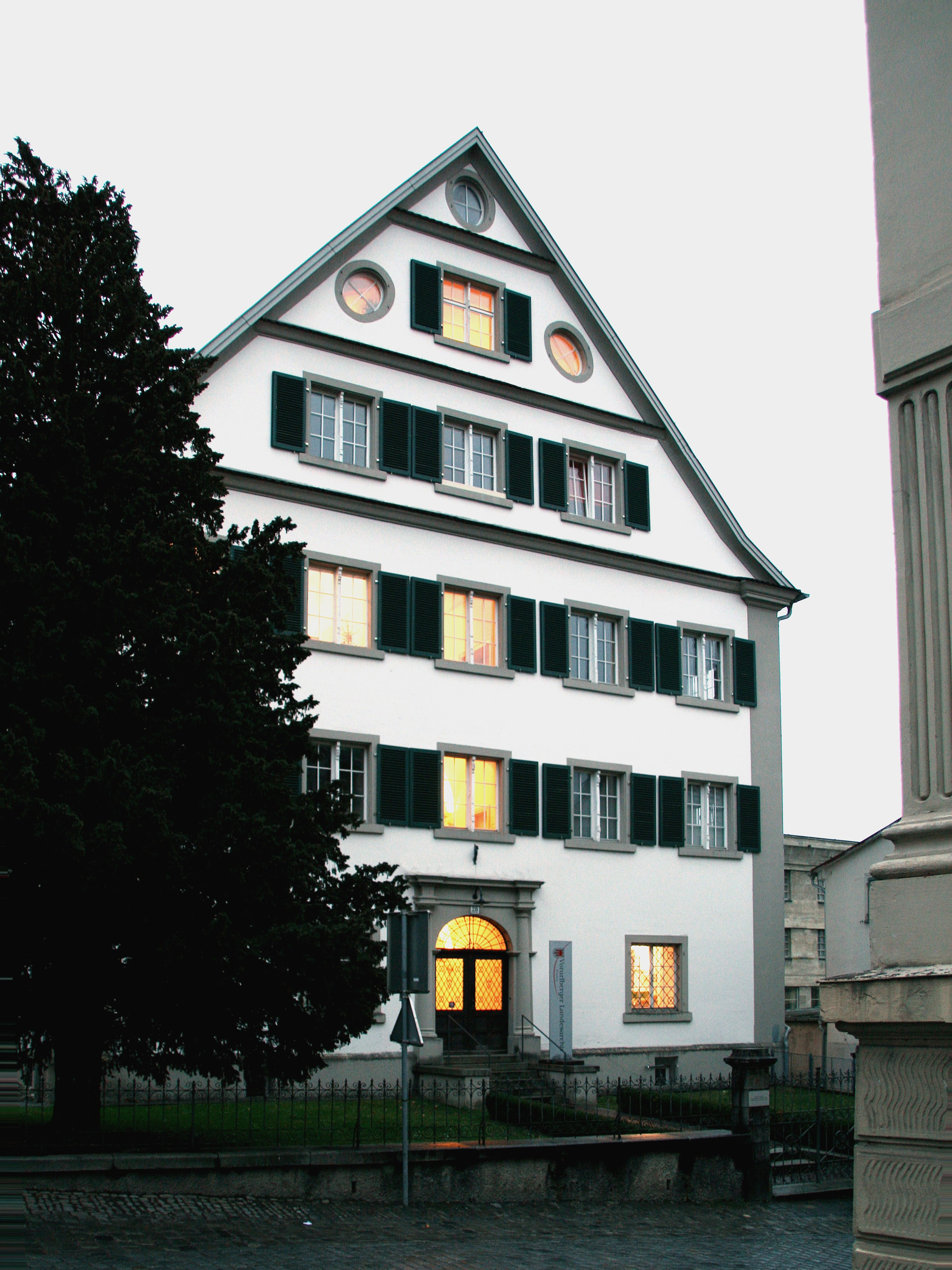 aus dem DEHIO Vorarlberg 1983: Vorarlberger Landesarchiv, (ehemals Palais "Waldburg-Wolfegg"), erbaut 1688-1690 möglicherweise von Johann Georg Kuen, vollendet 1731. Zurückgesetzt von der Strasse in Vorgarten, 3geschossig, Satteldach mit Giebel zur Strasse, 5 Fensterachsen, Eingangsportal gerahmt von toskanischen Säulen auf Postamenten, Architrav. Drei Klebdächer im Giebeldreieck, Ochsenaugen. Kreuzgewölbte Flure und Stiegenhaus. Fenster und Türen mit Steckgitter. Decken mit Stuckleisten. Hinterer Sichtbetonbau von Willibald Braun 1931/32. *** an der Kirchstrasse Nr. 28 in Bregenz, Vorarlberg. Quelle: Dehio Vorarlberg.